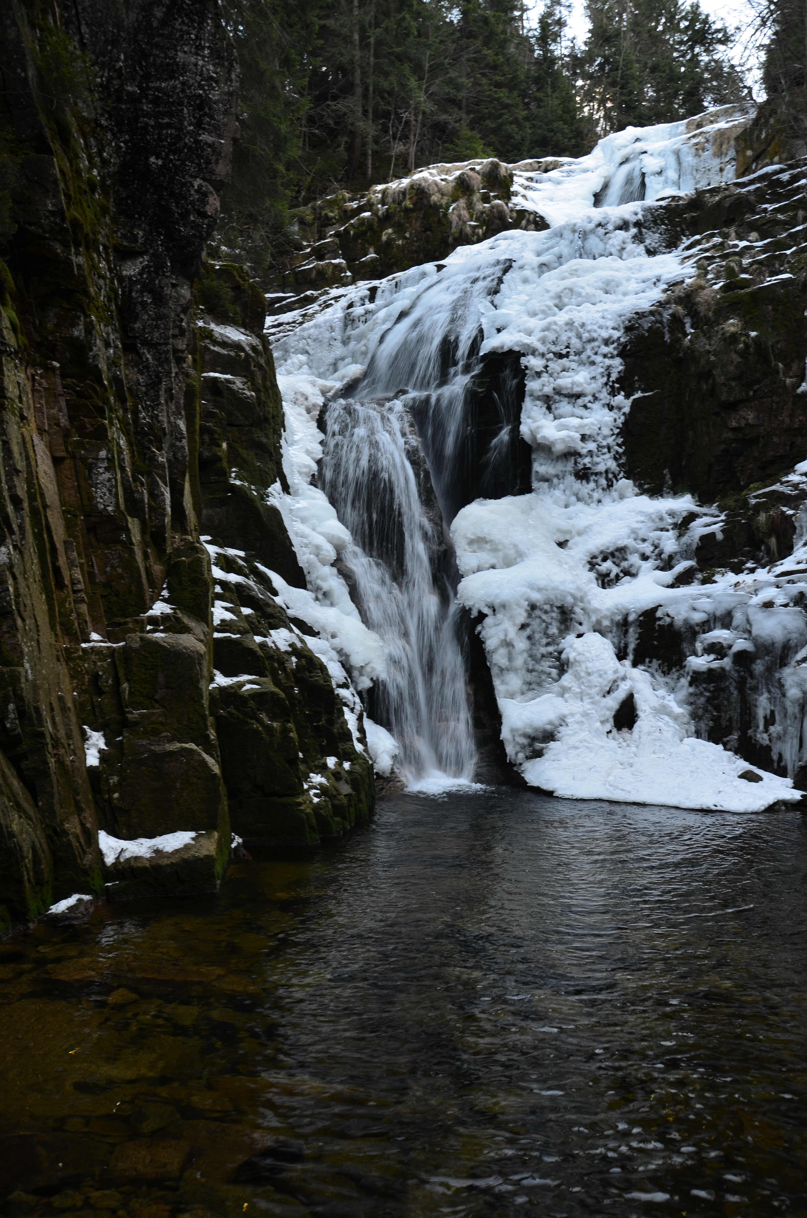 W drodze na Szrenicę This is a photography of Natura 2000 protected area with ID PLB020009